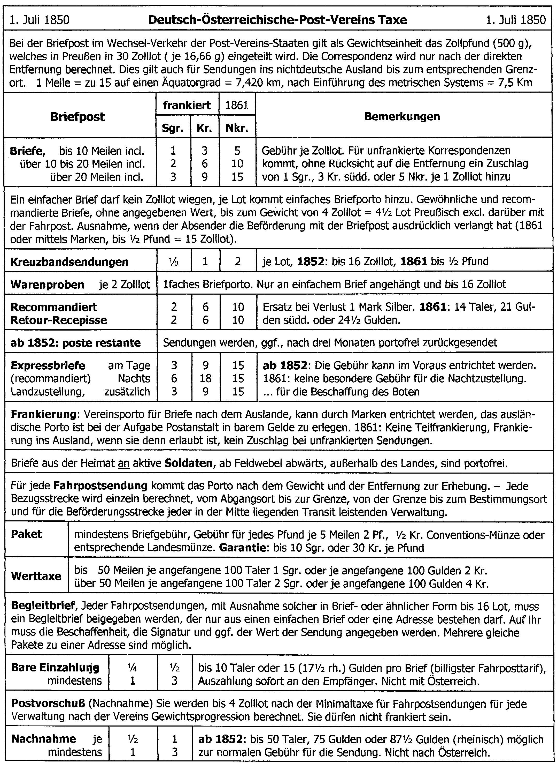 Deutsch-Österreichischer-Post-Verein, Tarife, 1850; eigenbau 2006 W.Steven 12:11, 21. Nov. 2006 (CET)